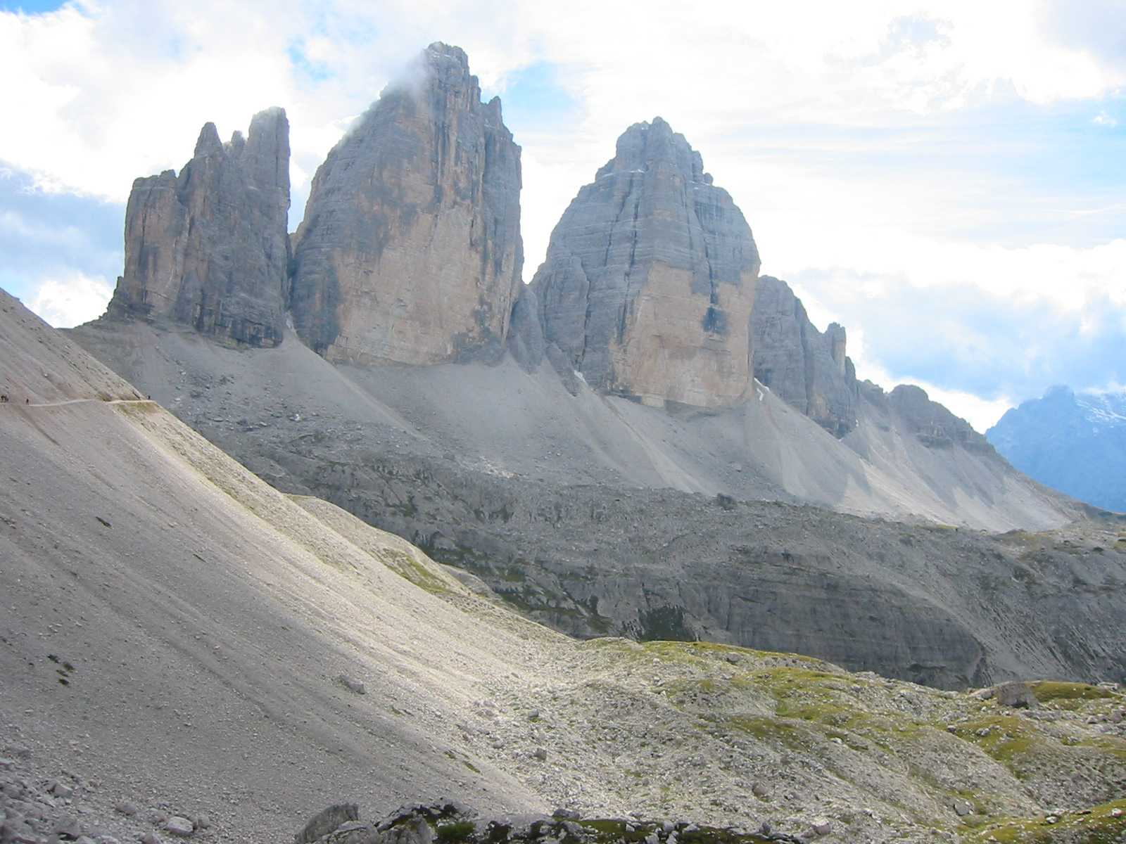 Drei Zinnen, fotografiert im September 2004 von Fantasy :-)